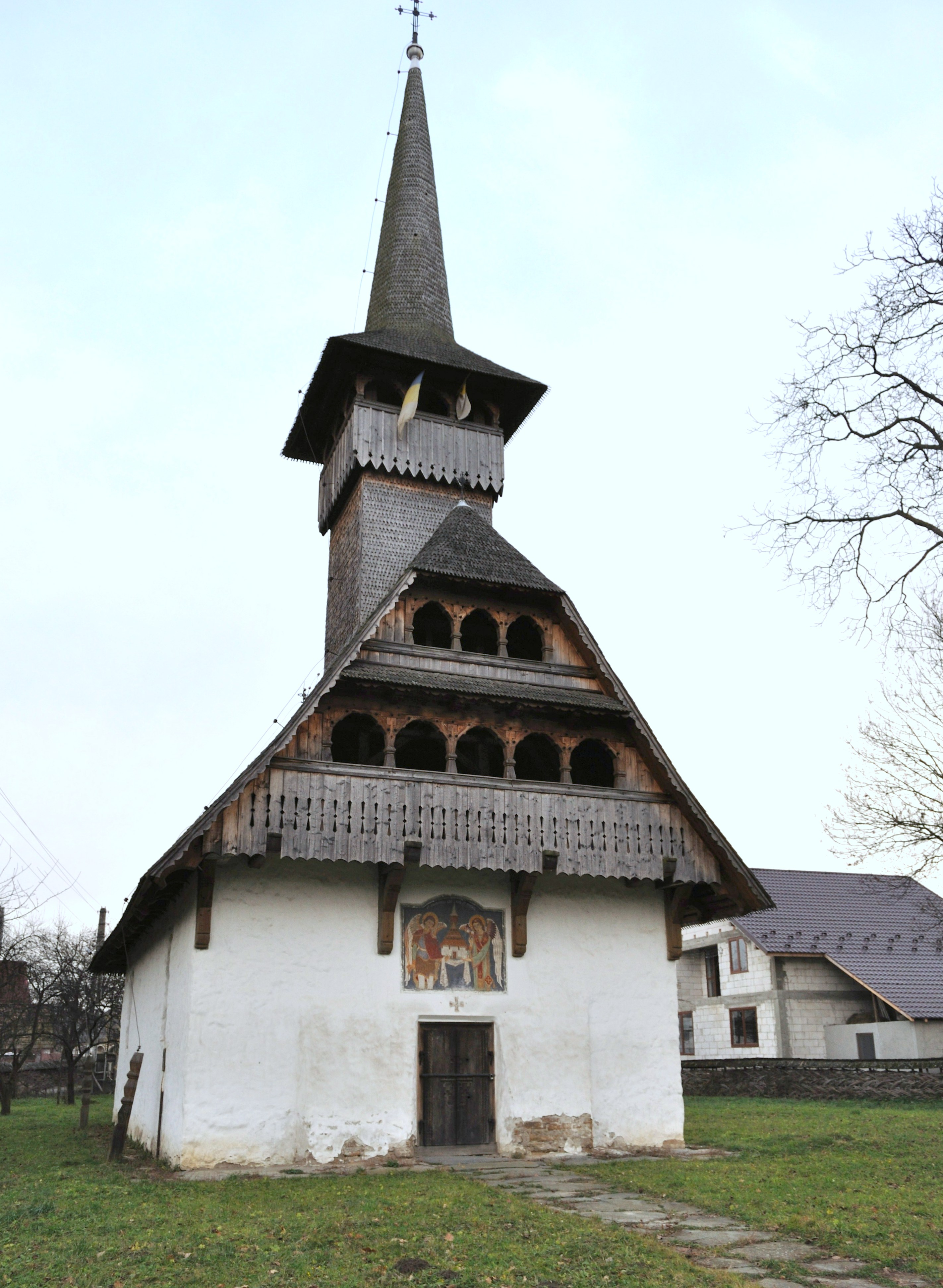 Biserica monument „Sfinții Arhangheli” din Sarasău, județul Maramureș